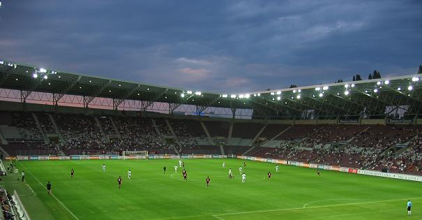 Stade de Geneve